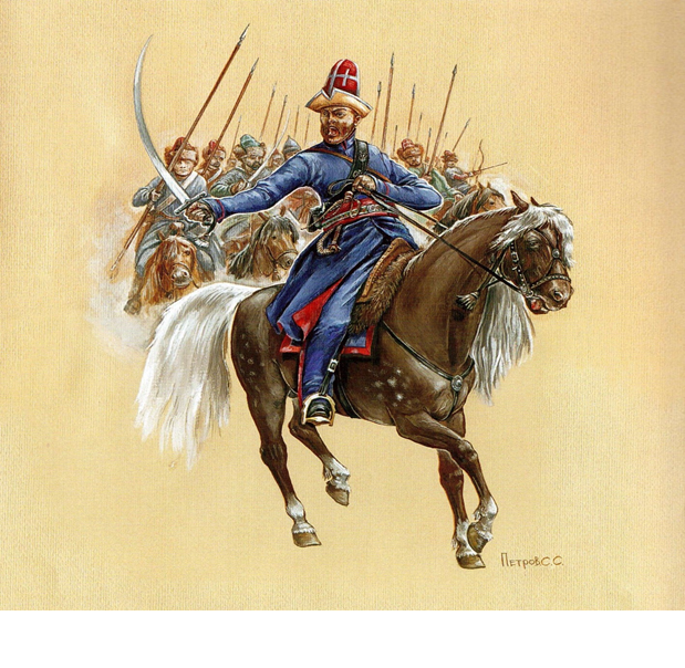 Башҡортса: Сергей Петров, 2011 йыл, гуашь